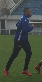 Photo prise le 04/01/2018 à la ville de Carnac lors du Stage Hivernale du Club de Football: l'AJ Auxerre